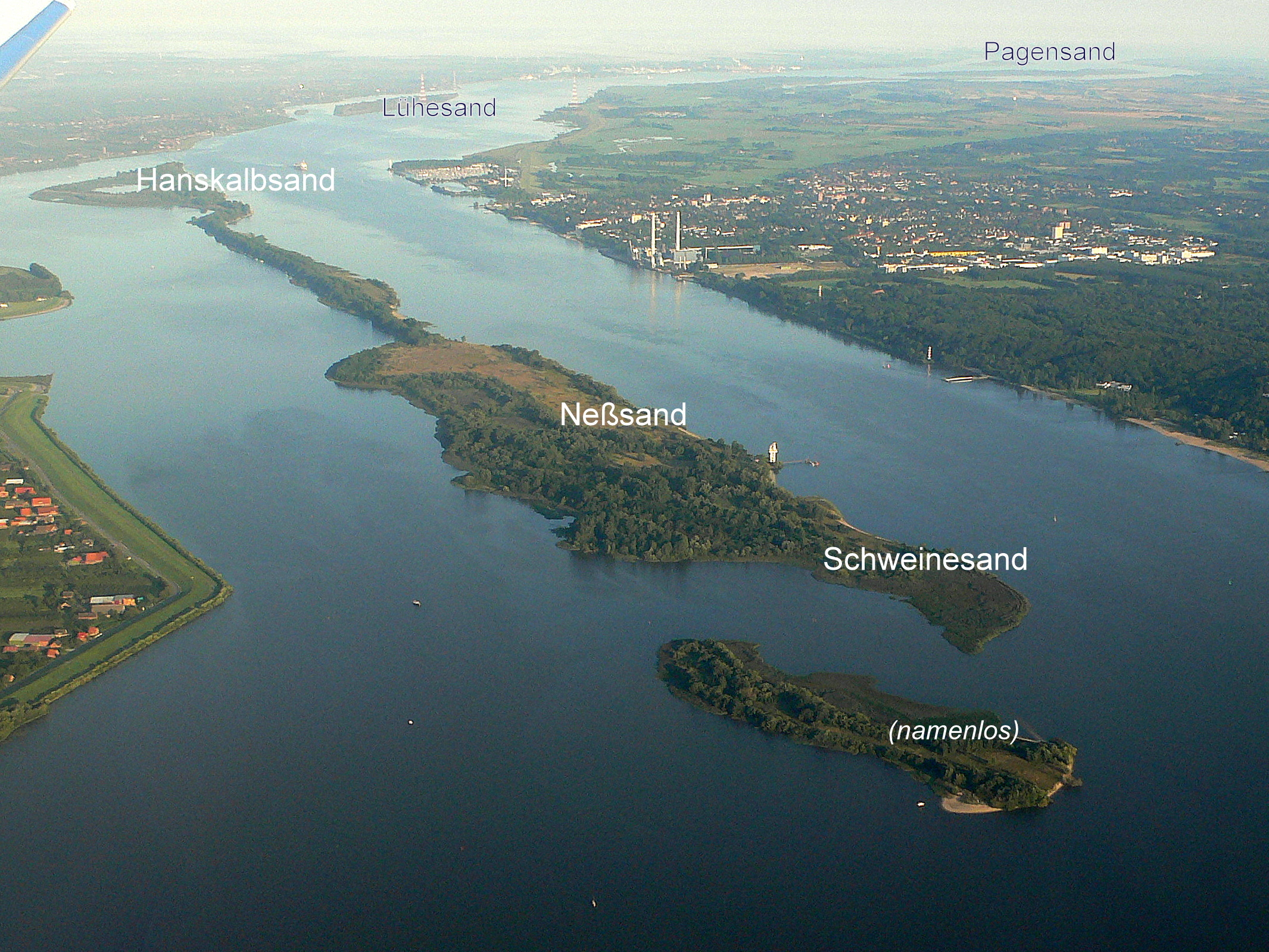 Luftbild von Schweinesand, Neßsand und anderen Elbinseln